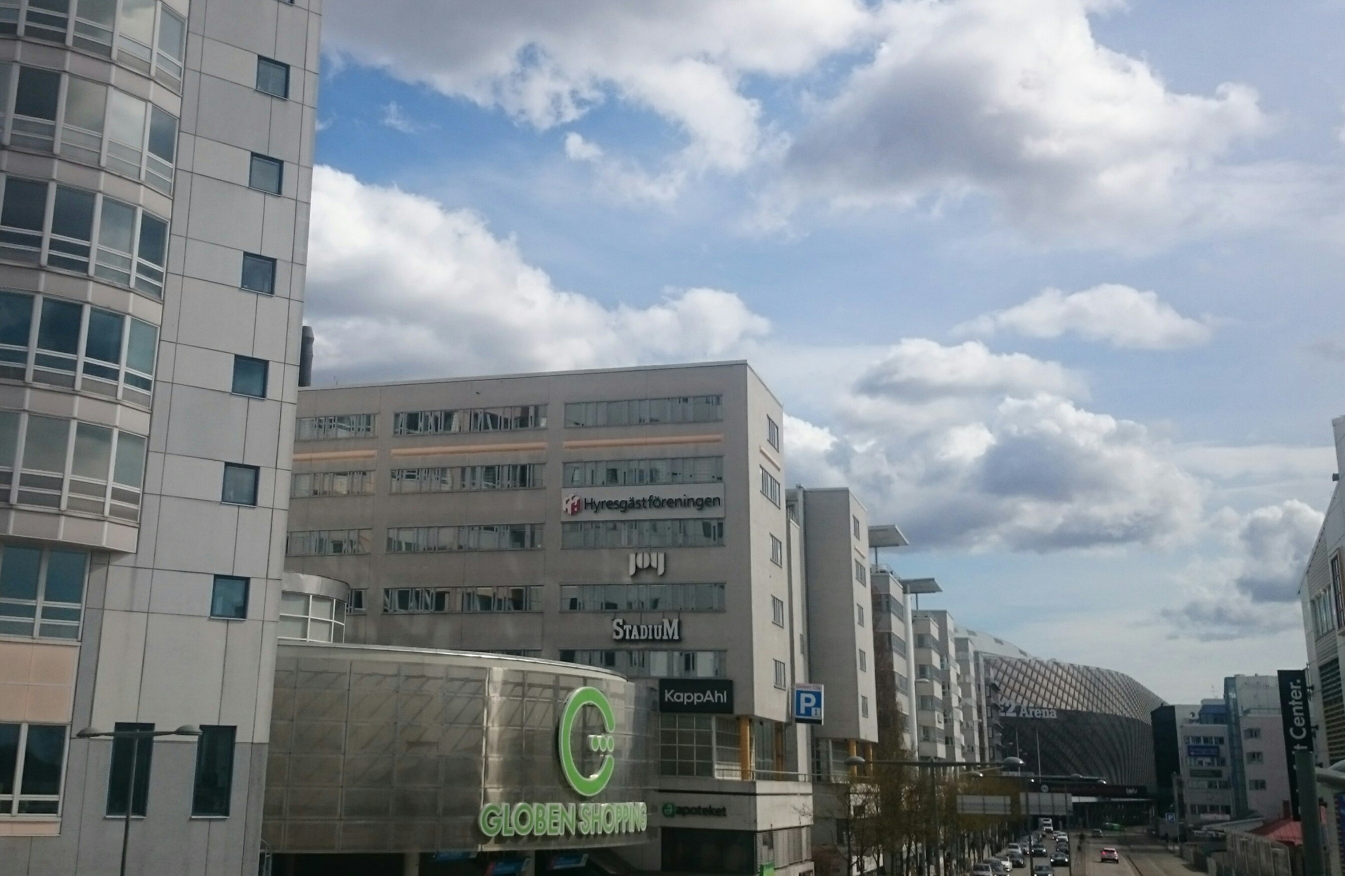 Hyresgästföreningen Region Stockholm.